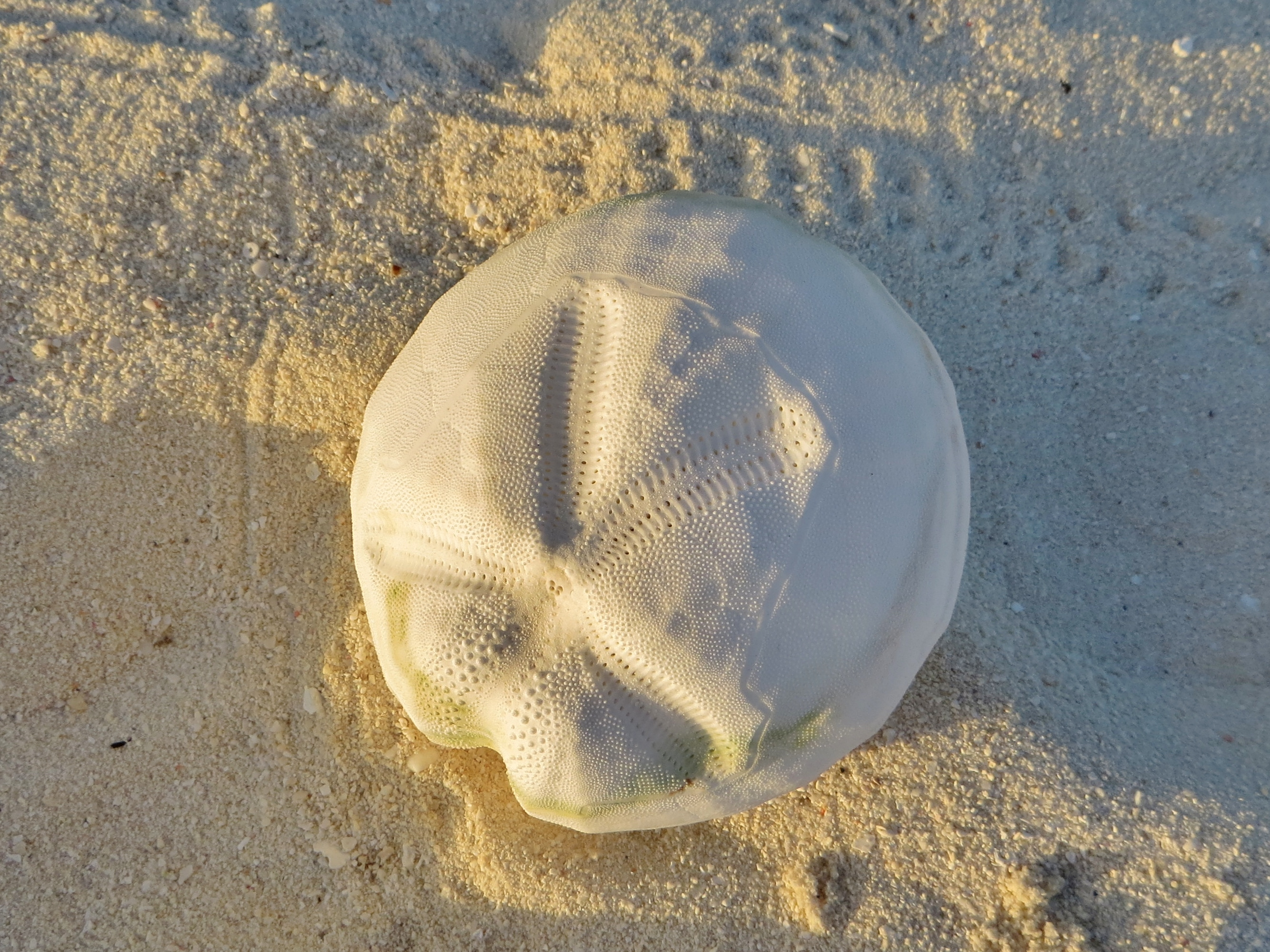 Le test échoué sur une plage d'un oursin irrégulier Metalia sternalis, aux Maldives (atoll de Baa).